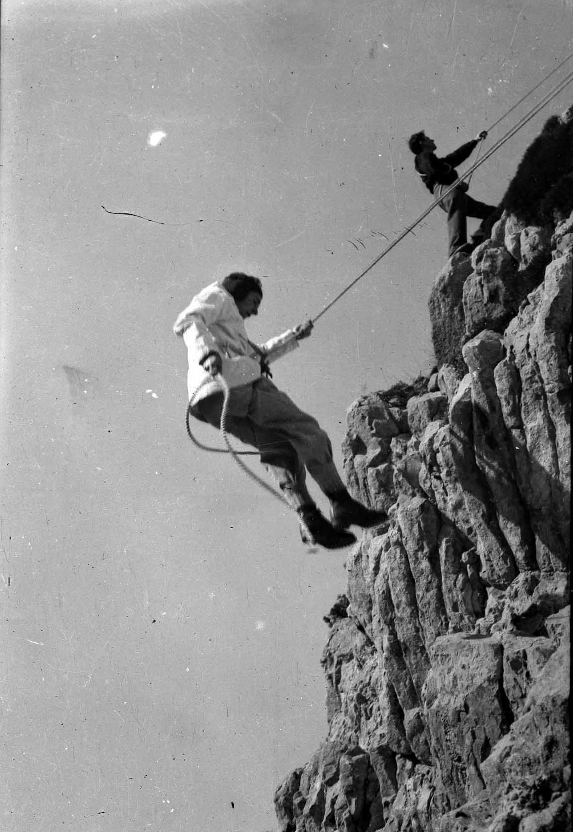 Eskaladako ikastaroa Egoarbitzan (Elgeta), 1949an